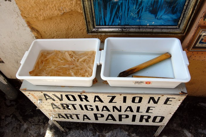 Lvorazione artigianale della carta di papiro (Siracusa)